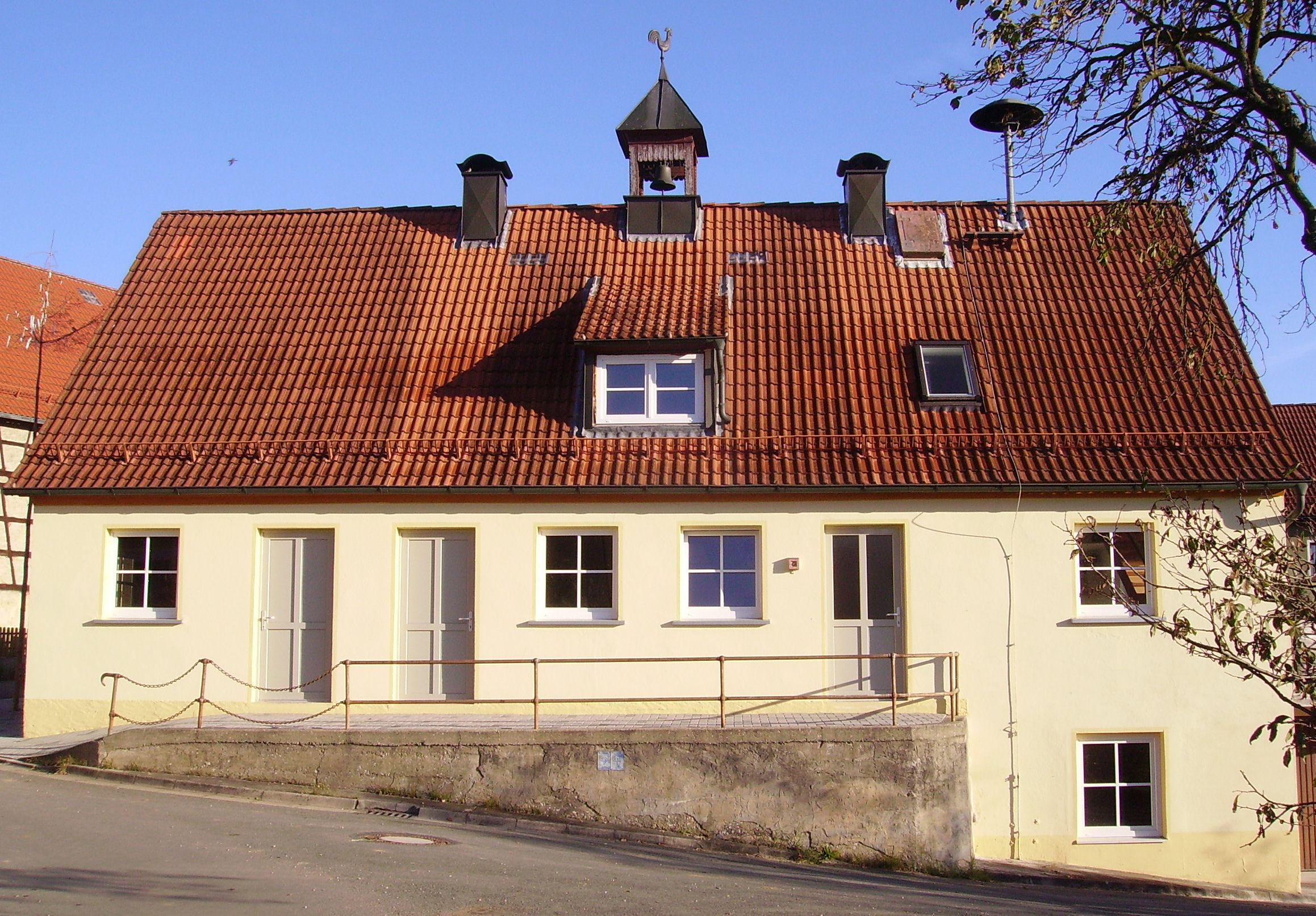 view of Stücht, part of Heiligenstadt in Oberfranken in northern Upper Franconia, Germany